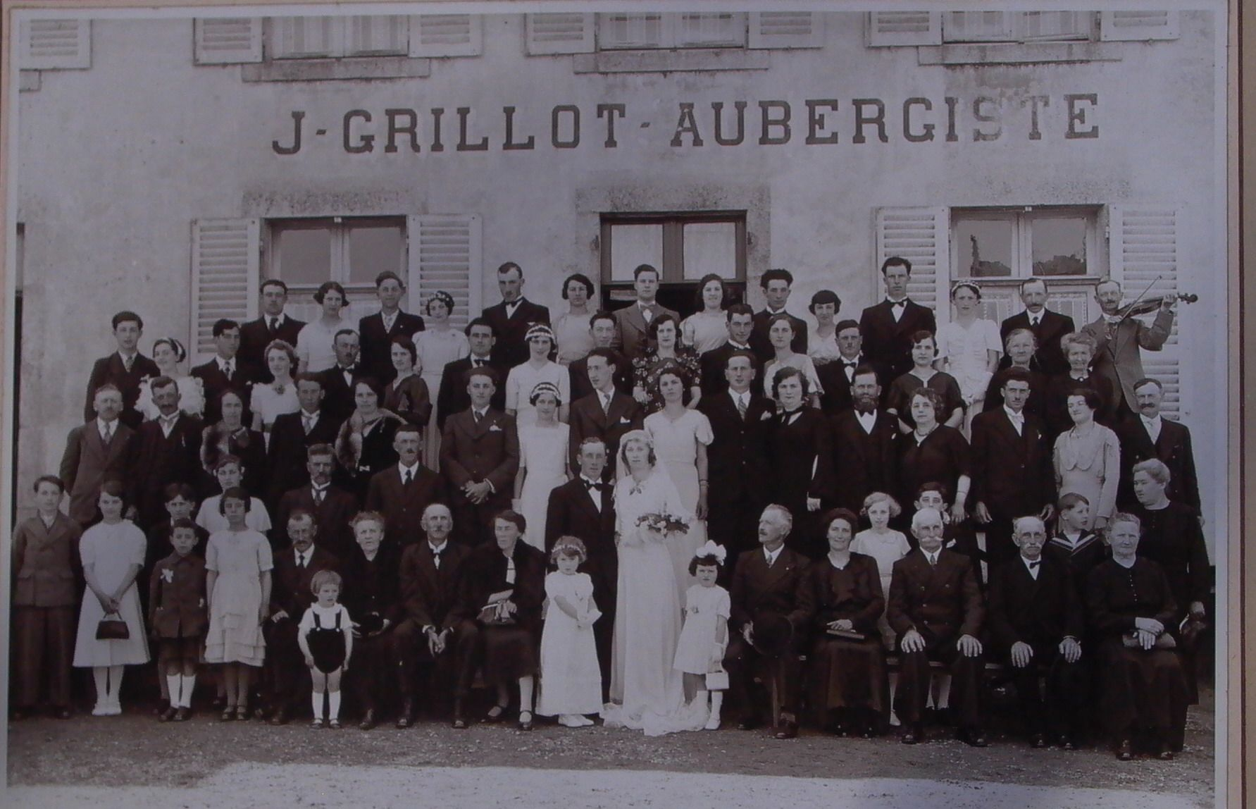 Les cafés de la place reçoivent banquets et mariage